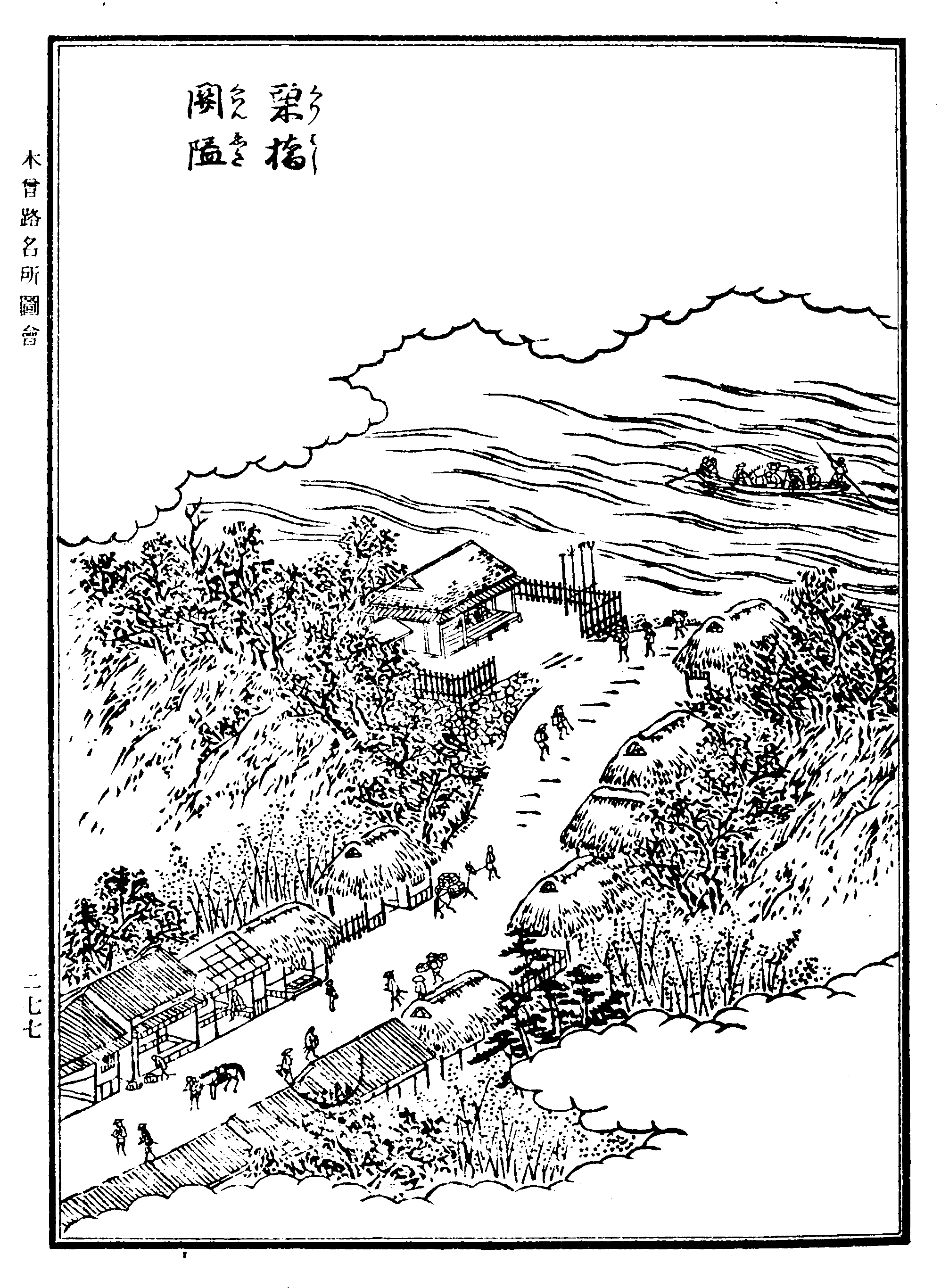 江戸時代、日光・奥州街道における栗橋関所の図